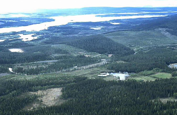 Vojmsjöns sydöstra ände, område med boplatser från stenåldern och fångstgropssystem. Motiv: Gråtanån Nyckelord: Flygbilder, Riksintressen Kategori: Fjällbygd Vojmsjöns sydöstra ände, område med boplatser från stenåldern och fångstgropssystem.